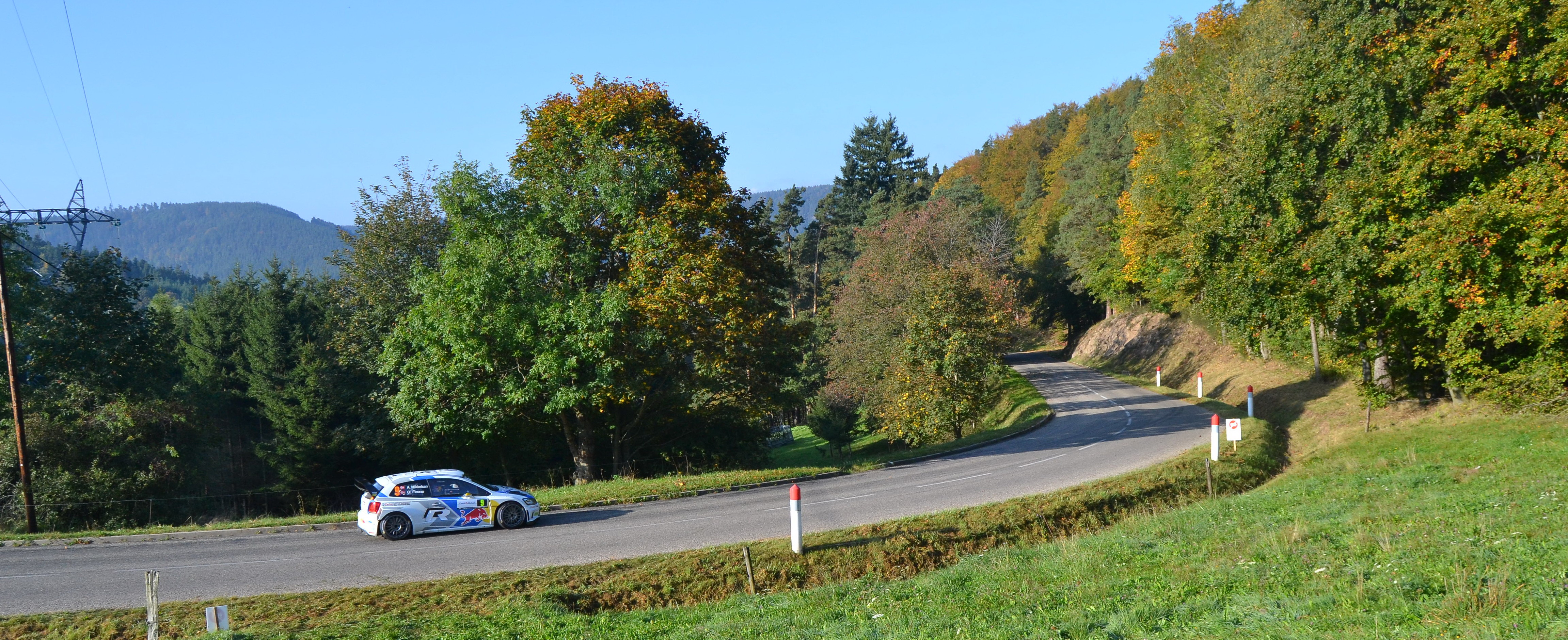 Rallye WRC France-Alsace 2014, ES9 Soultzeren - Le Grand Hohnack 1 à Labaroche. Volkswagen Polo R WRC - Andreas Mikkelsen - Ola Fløene